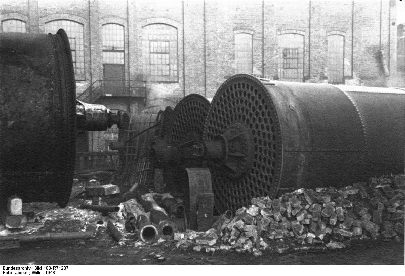 Illus- Willi Jockel Grube Friedrich-Ernst, Niederlausitz 1948; Röhrentrockner für Rohkohle vor dem Einbau. 1305-48